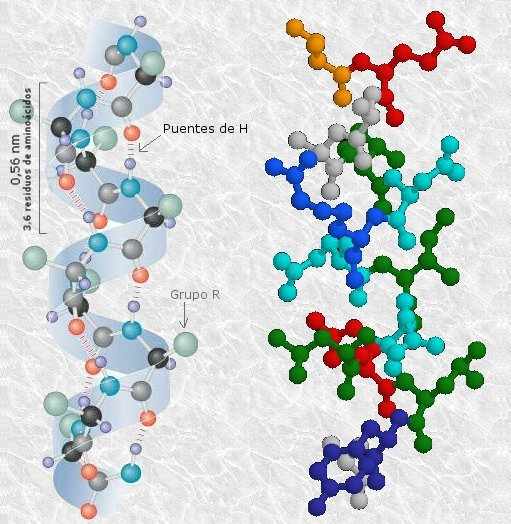 Esquema y modelo de bolas y varillas de la hélice alfa de las proteínas